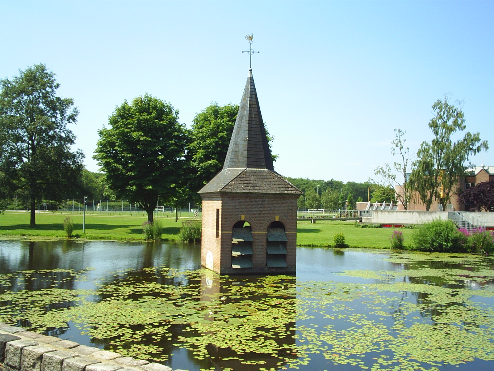 Het Torentje van Drienerlo (the 'Little Tower of Drienerlo')